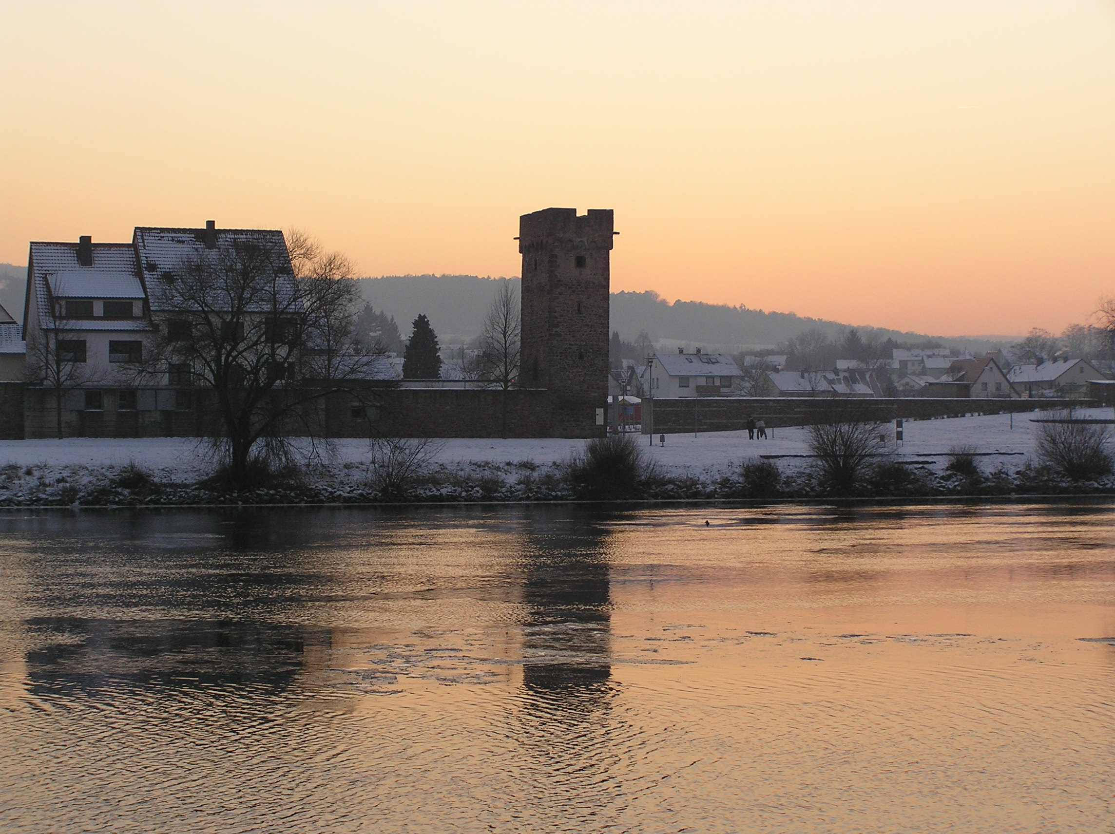 Der Wörther Tannenturm am Mainufer im Sonnenuntergang